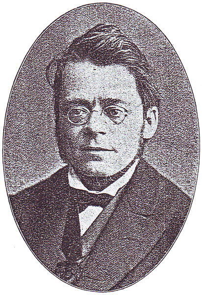 Heinrich Wuttke (1818–1876), deutscher Historiker; Bildunterschrift: „Prof. Dr. Wuttke“